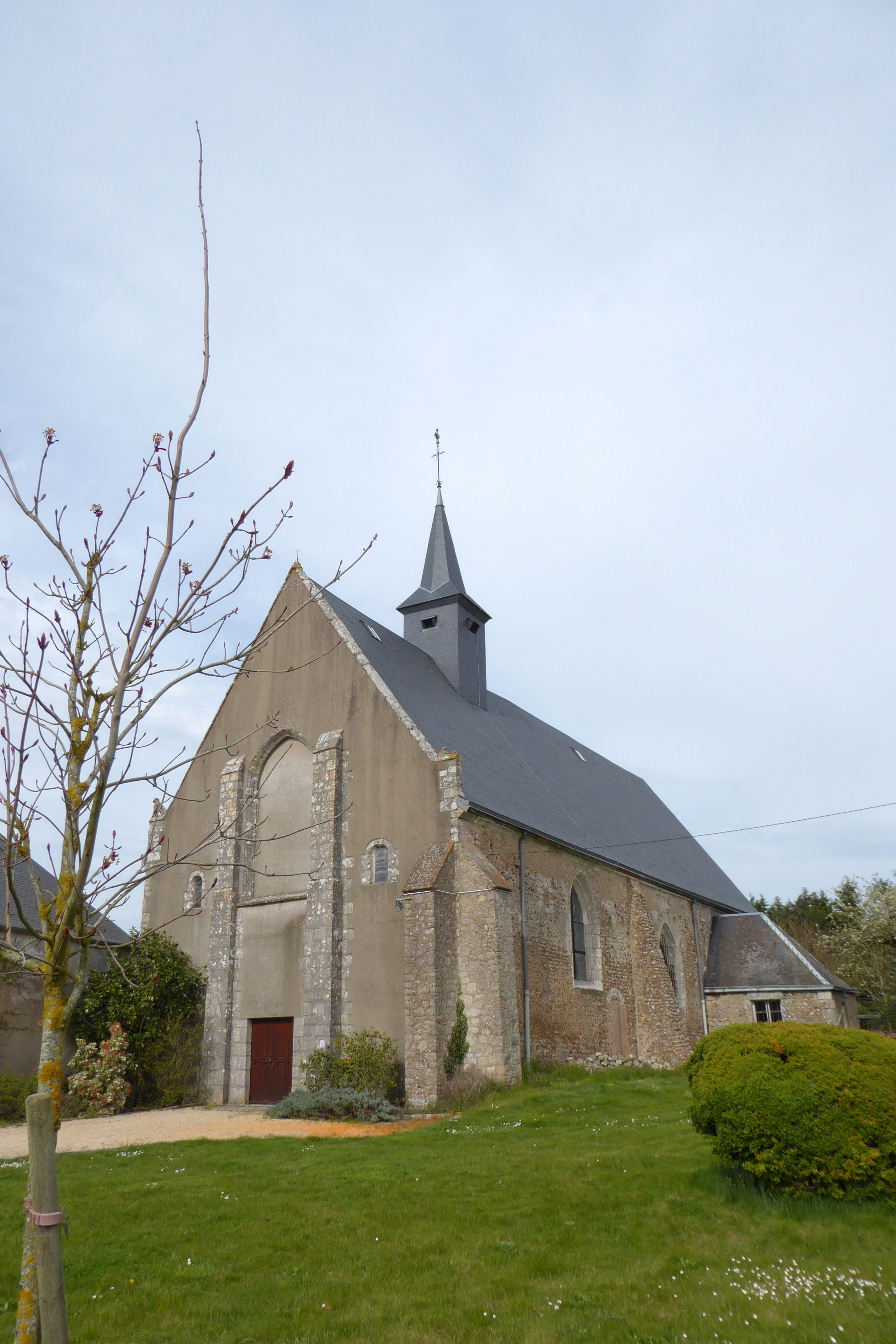 église Saint-Martin-et-Saint-Jouvin, Sandarville, Eure-et-Loir (France).